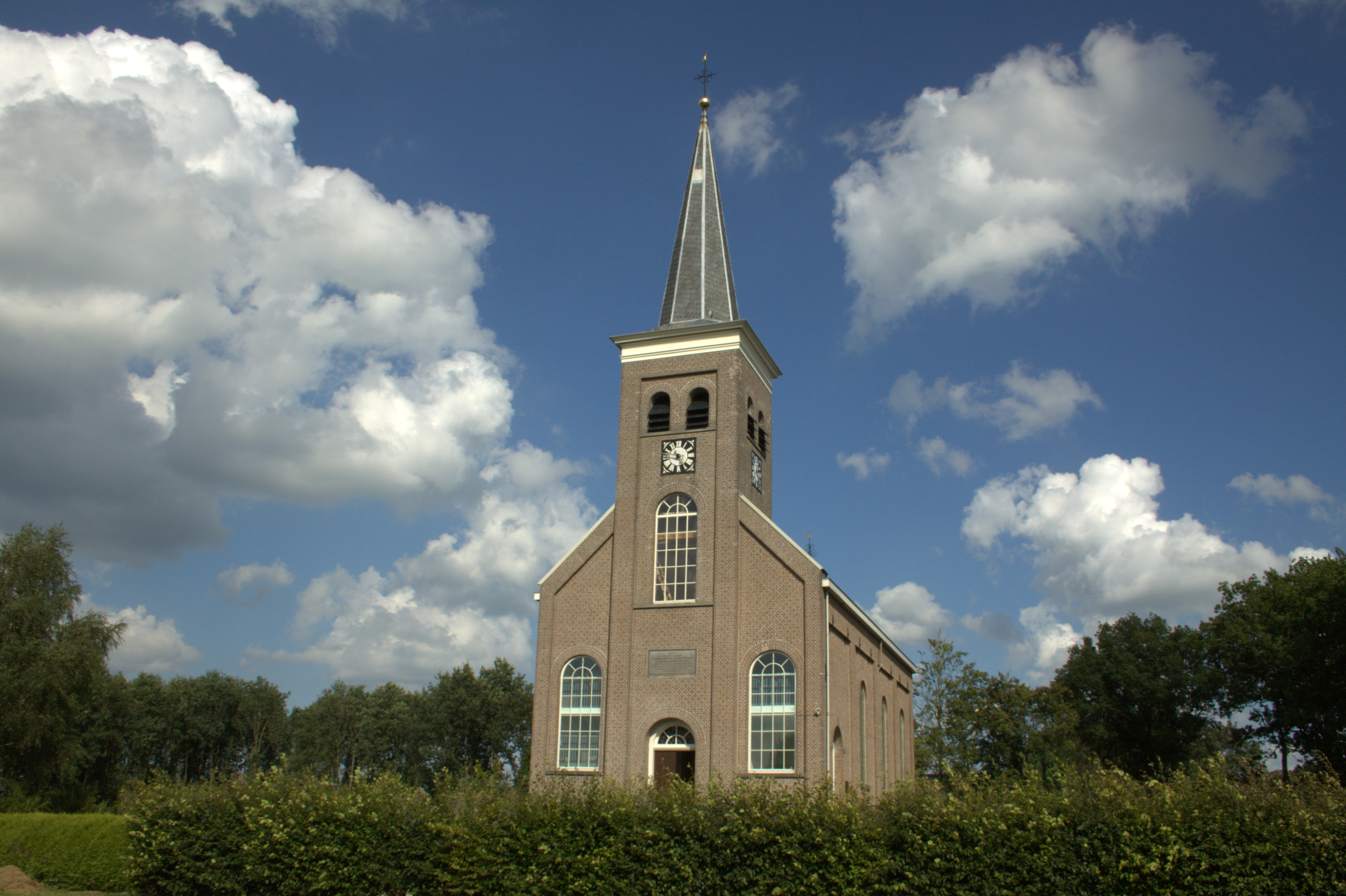 Hoog in het landschap staat de Hervormde kerk van Terwispel.